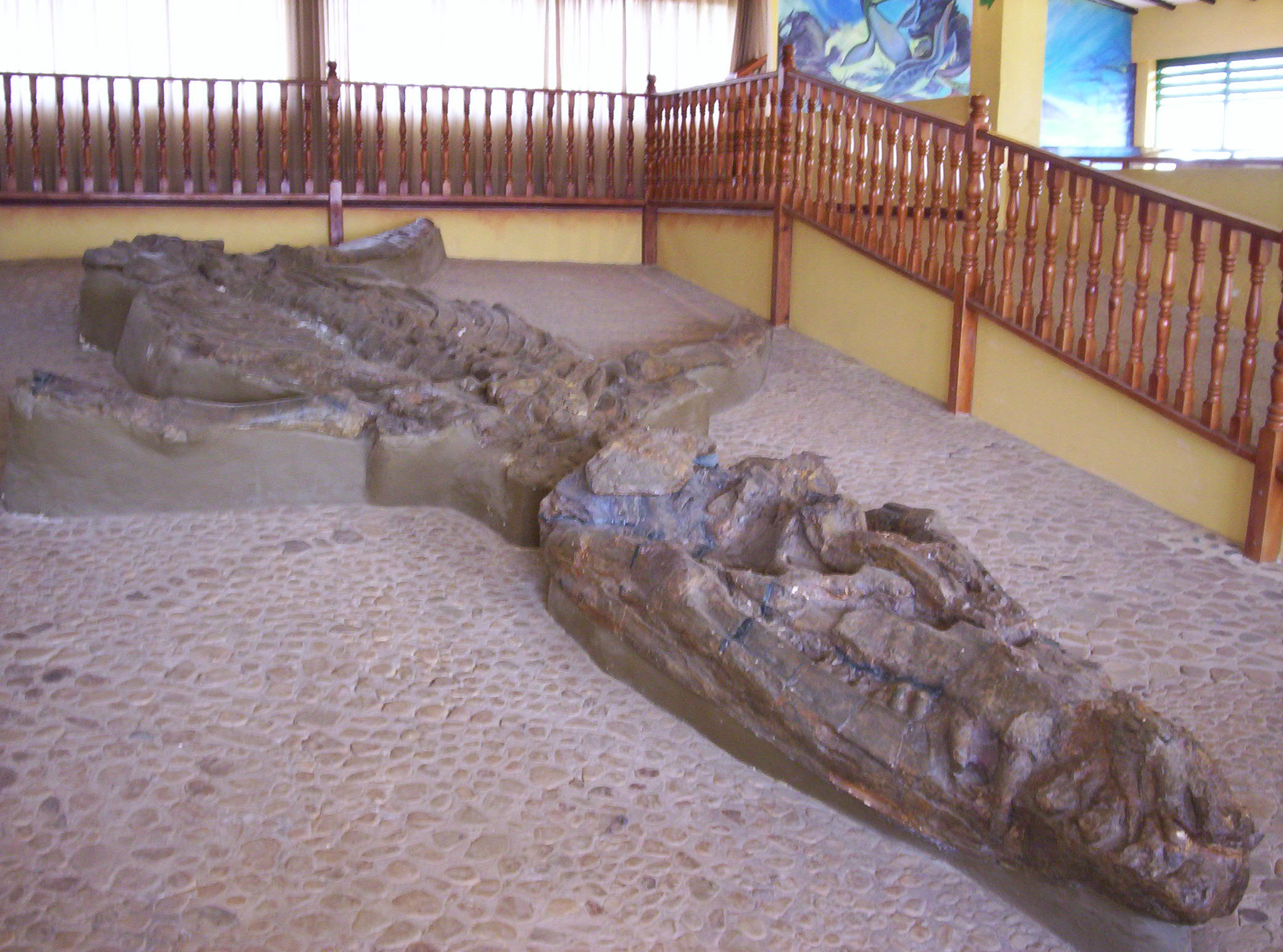 Fósil de Kronosaurus boyacensis encontrado en Villa de Leyva, Colombia en 1977. Se calcula su edad en 120 millones de años.